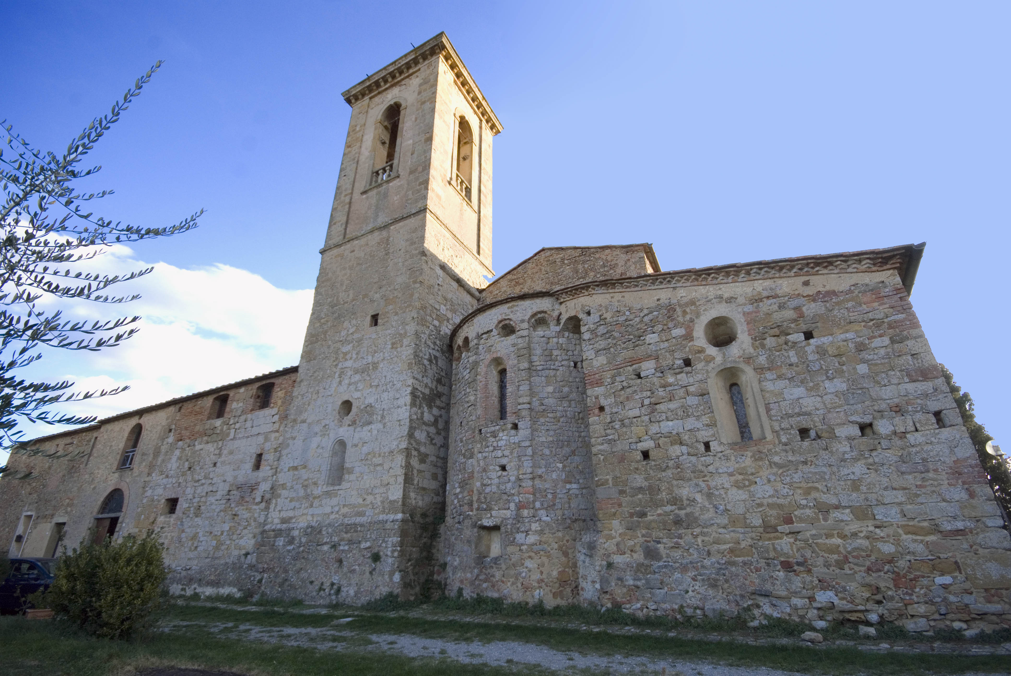 pieve di sant appiano abside